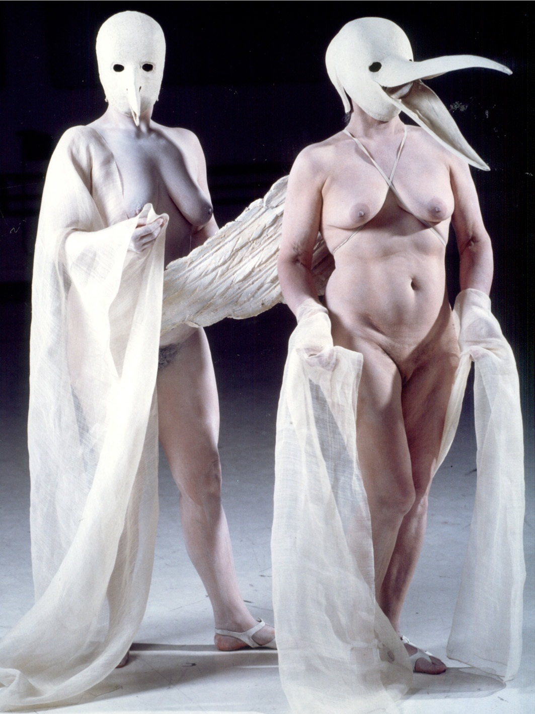 טנהויזר 1994